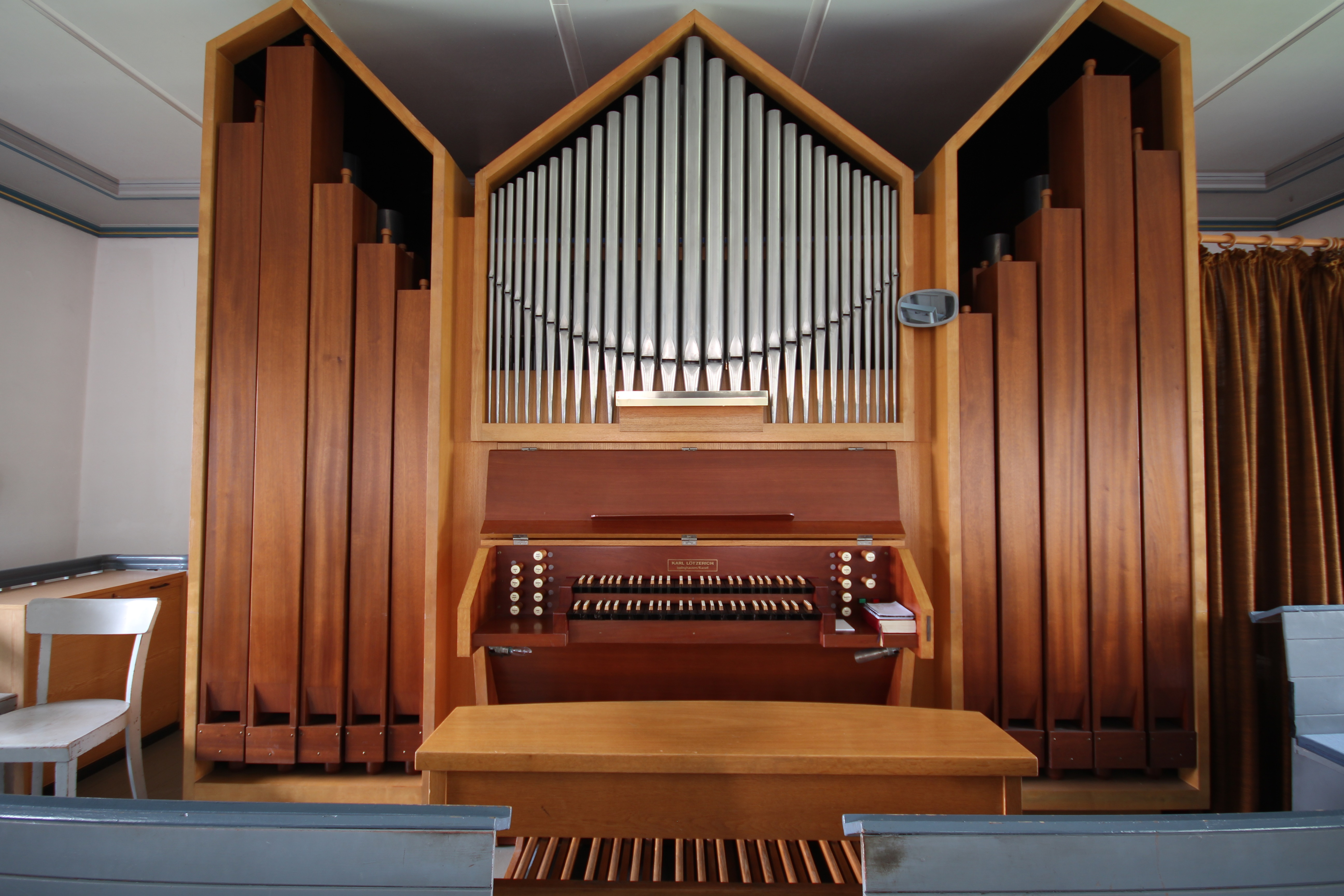 Lötzerich-Orgel der evangelischen Martinskirche zu Marburg-Wehrda